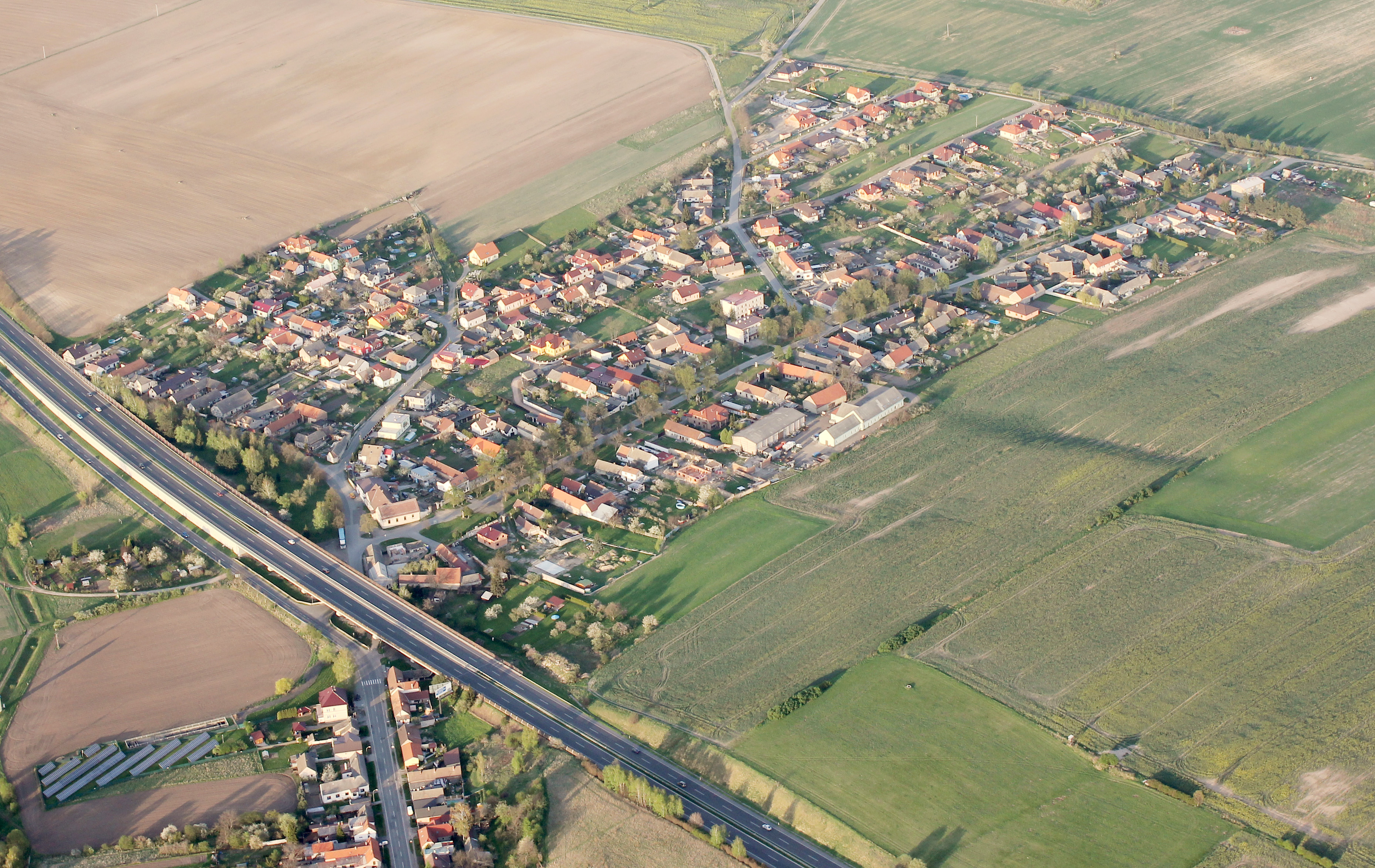 letecký snímek